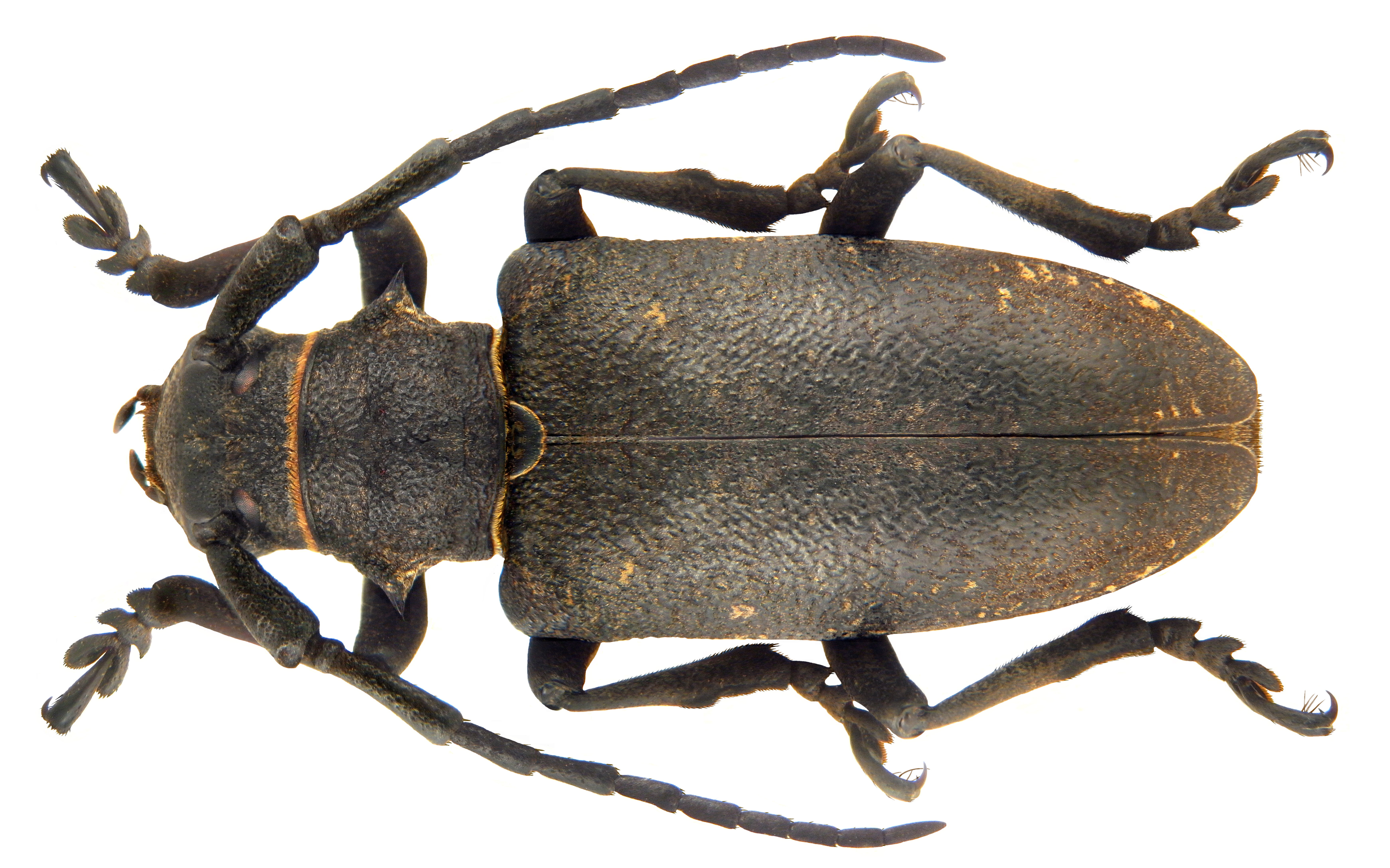 Familie; Cerambycidae Groesse: 14-32 mm Verbreitung: Europa Ökologie: Entwicklung in Laubholz Fundort: Italien, Südtirol, Vinschgau, Latsch leg.det. G.Rößler, 1970 Photo: U.Schmidt, 2010